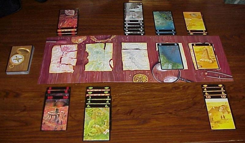 Detalle del tablero durante una partida de Exploradores